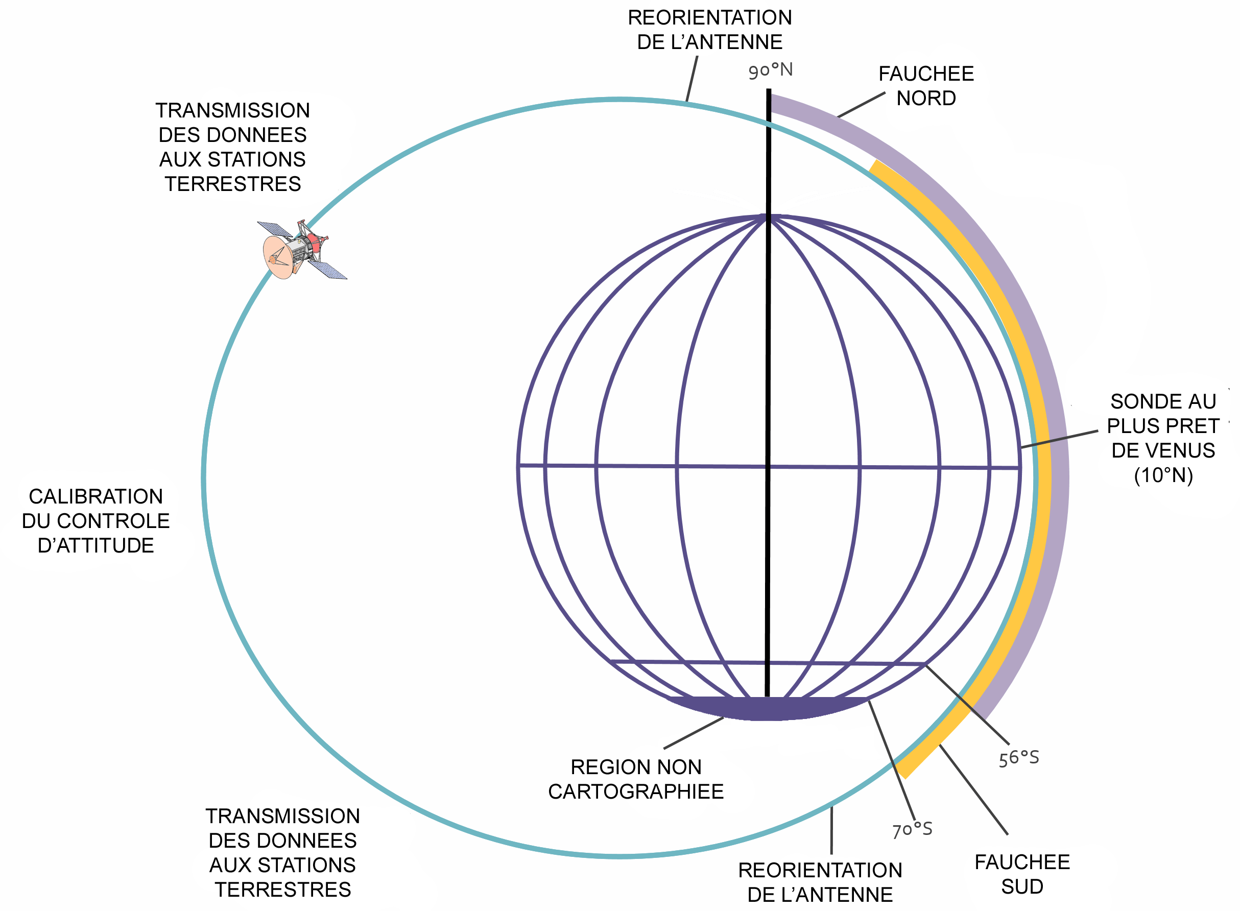 Orbite de la sonde vénusienne Magellan durant les phases de cartographie. version avec légende en français.